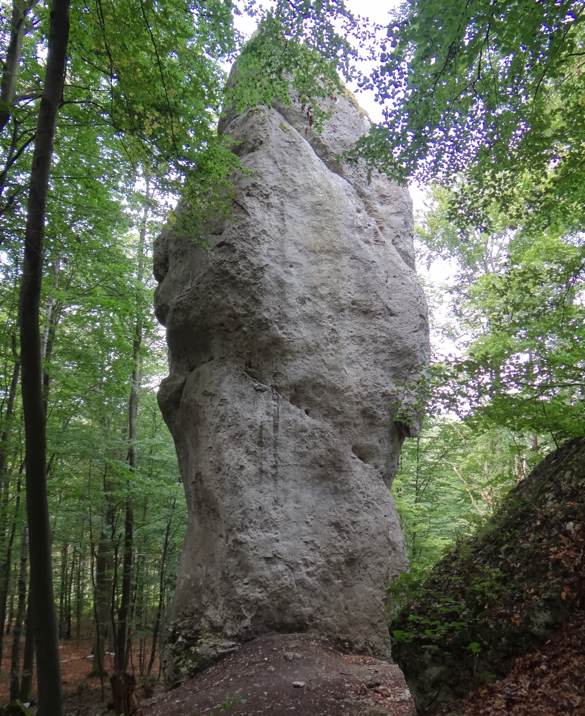 Skała Wieżyca w grupie skał Kroczyckich na wzniesieniu Jastrzębnik